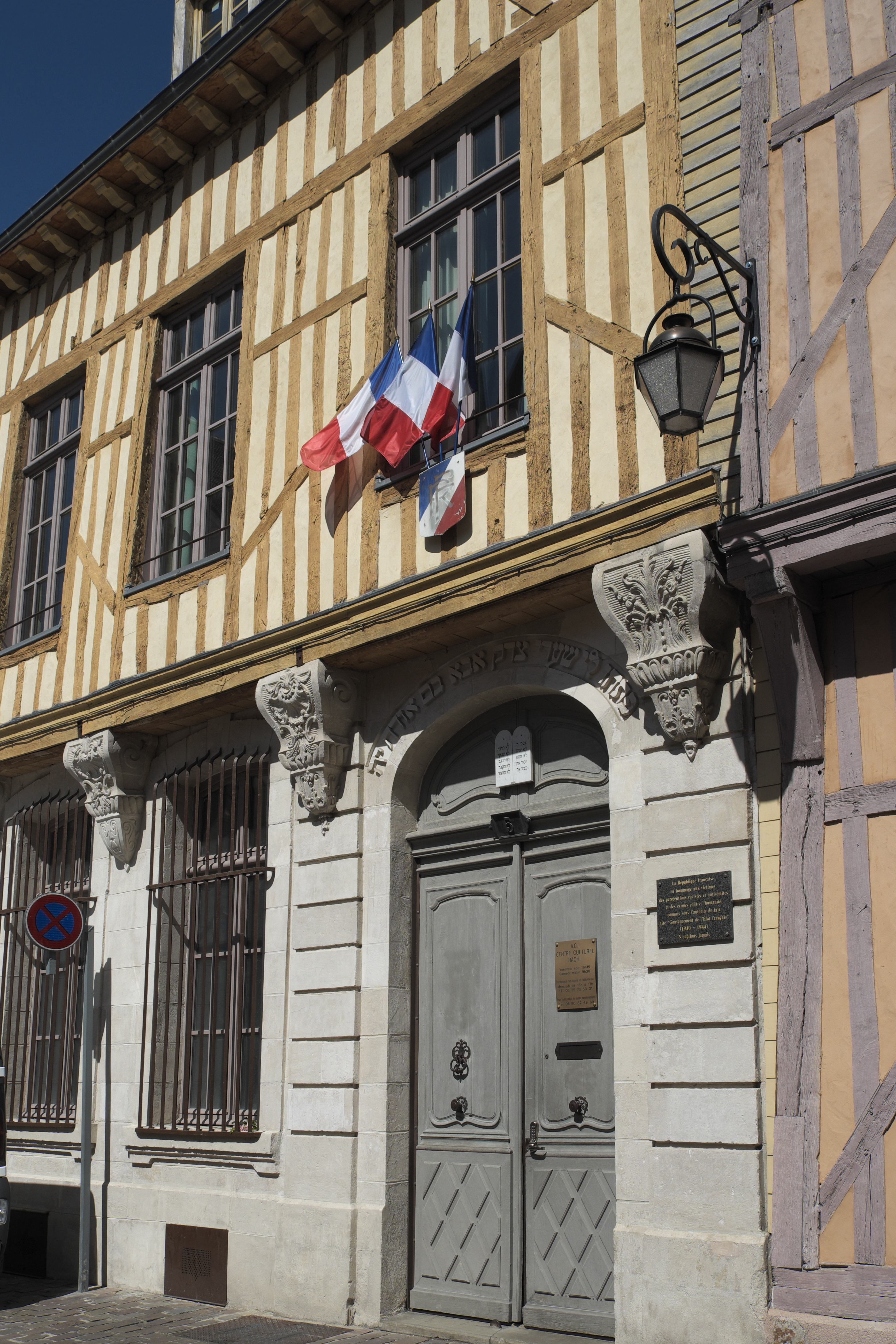 Synagogue Rachi, 5 rue Brunneval in Troyes im Département Aube (Champagne-Ardenne/Frankreich)